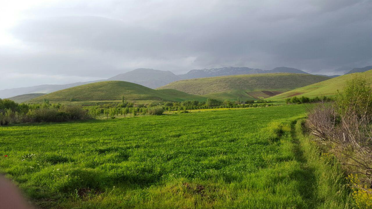 بیران شهر